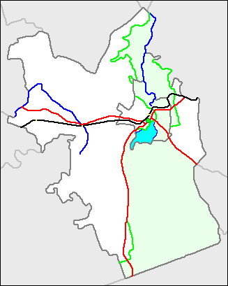 Mapa gminy Barlinek (Zachodniopomorskie)